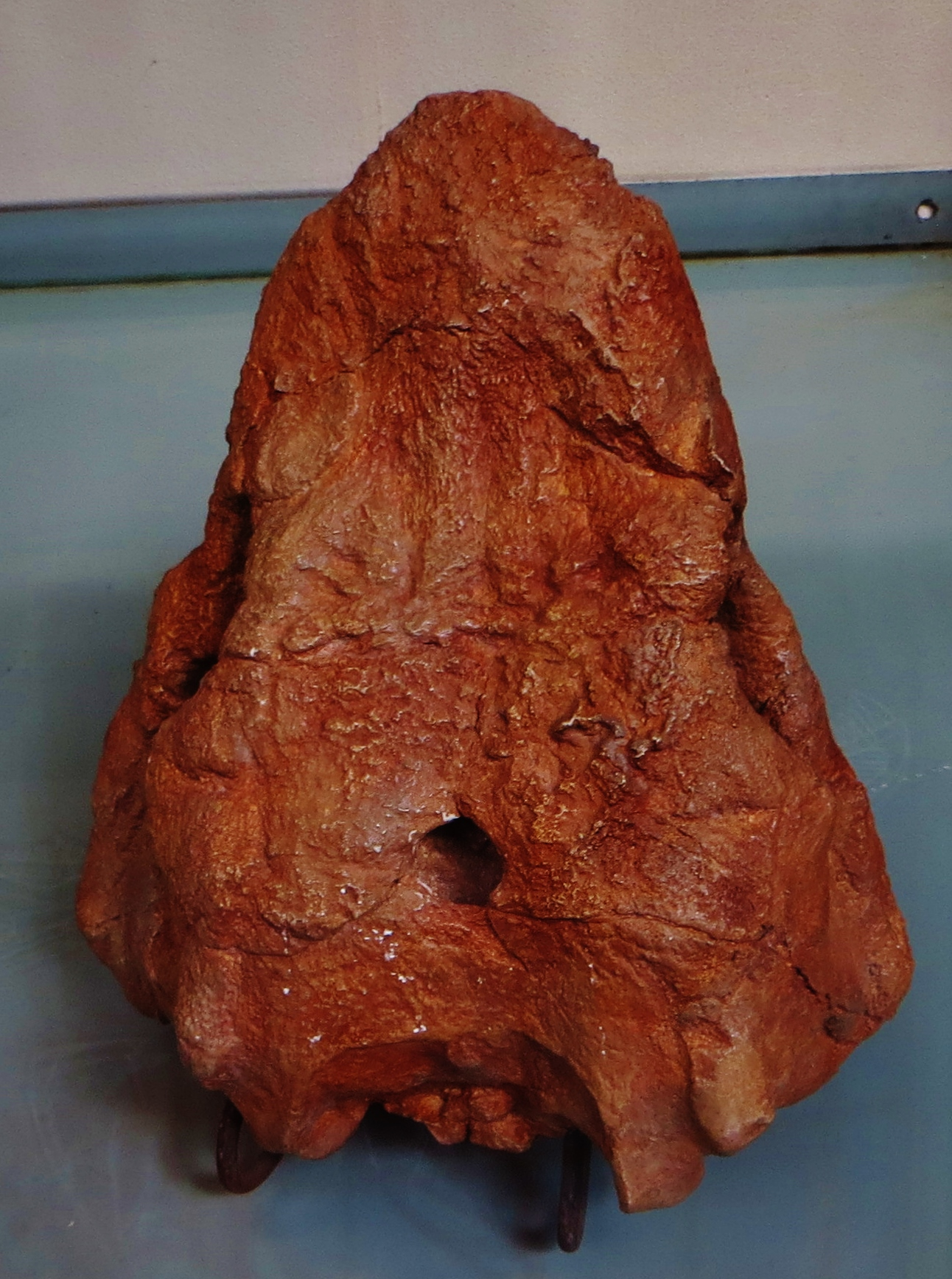 Fossil of Diadectes, an extinct tetrapod- Took the photo at Musee d'Histoire Naturelle, Paris